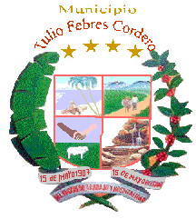 Escudo del municipio Tulio Febres Cordero. Estado Mérida. Venezuela